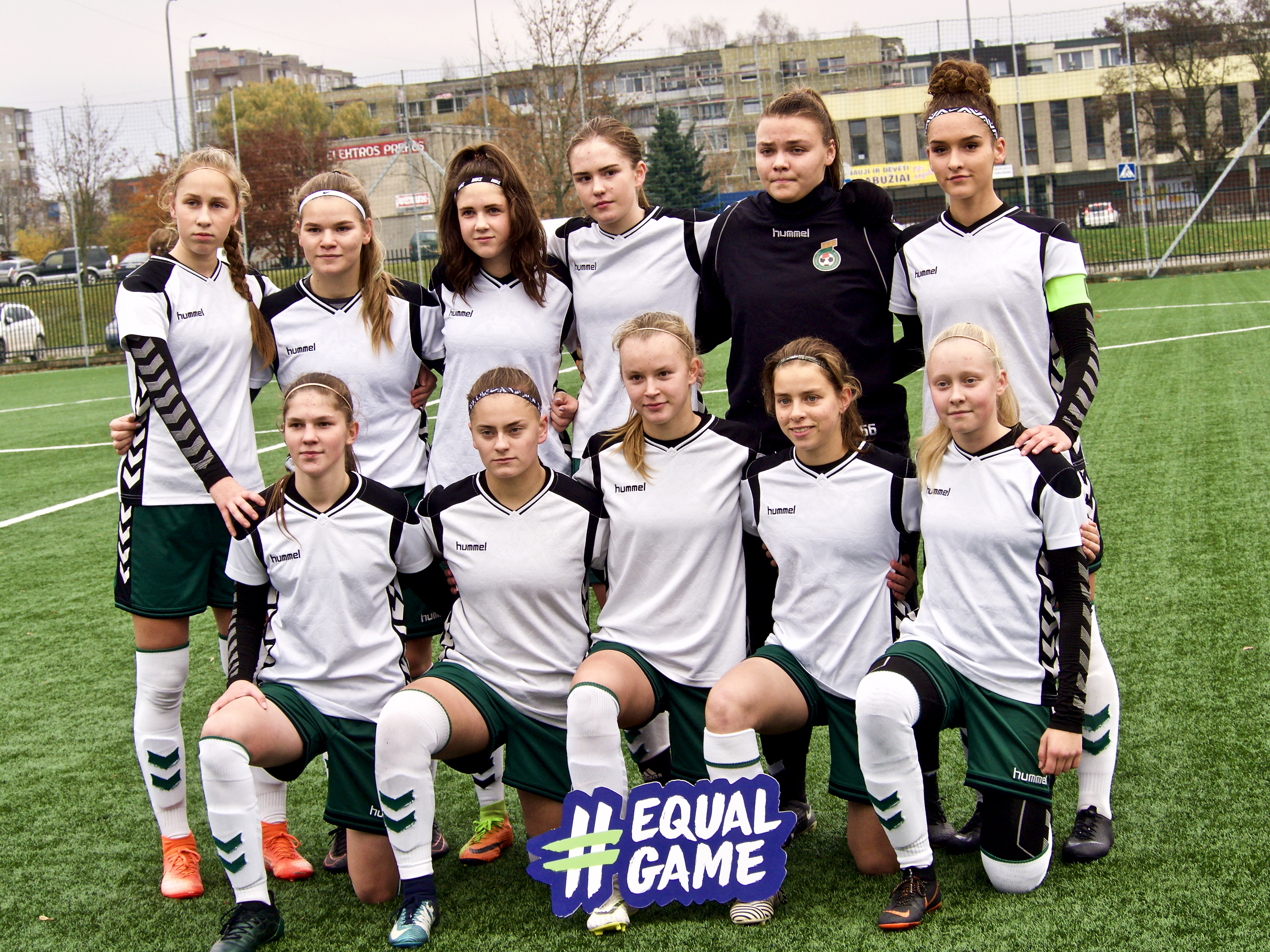 2018 - ųjų LMFA I lygos sezono finalinių rungtynių sudėtis